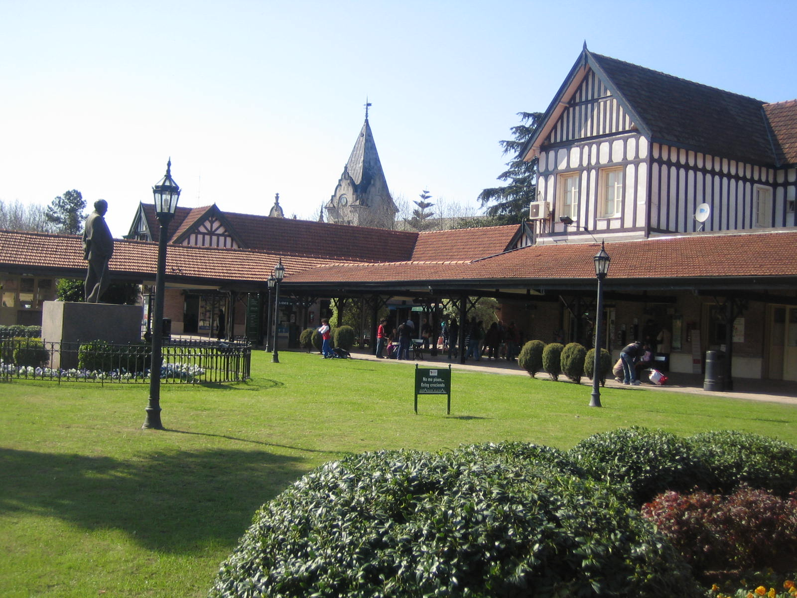 Estación fluvial de pasajeros Domingo Faustino Sarmiento - Buenos Aires - Argentina